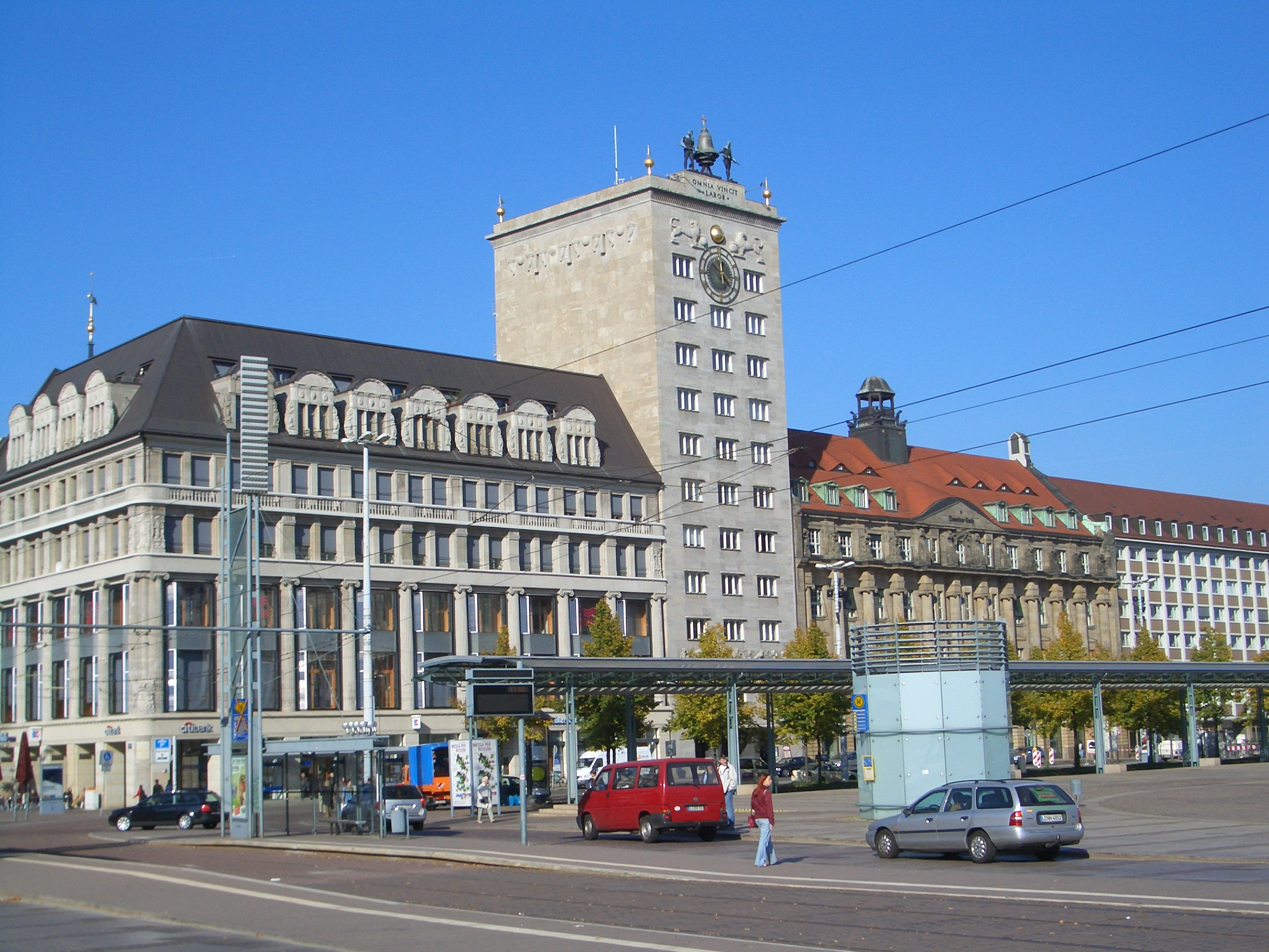 Augustusplatz, Leipzig